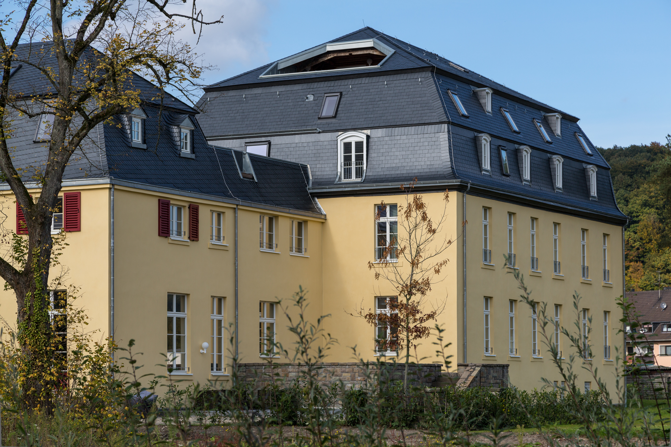 Rösrath, Denkmalnummer 23, Venauen (Haus Venauen) nach der Renovierung